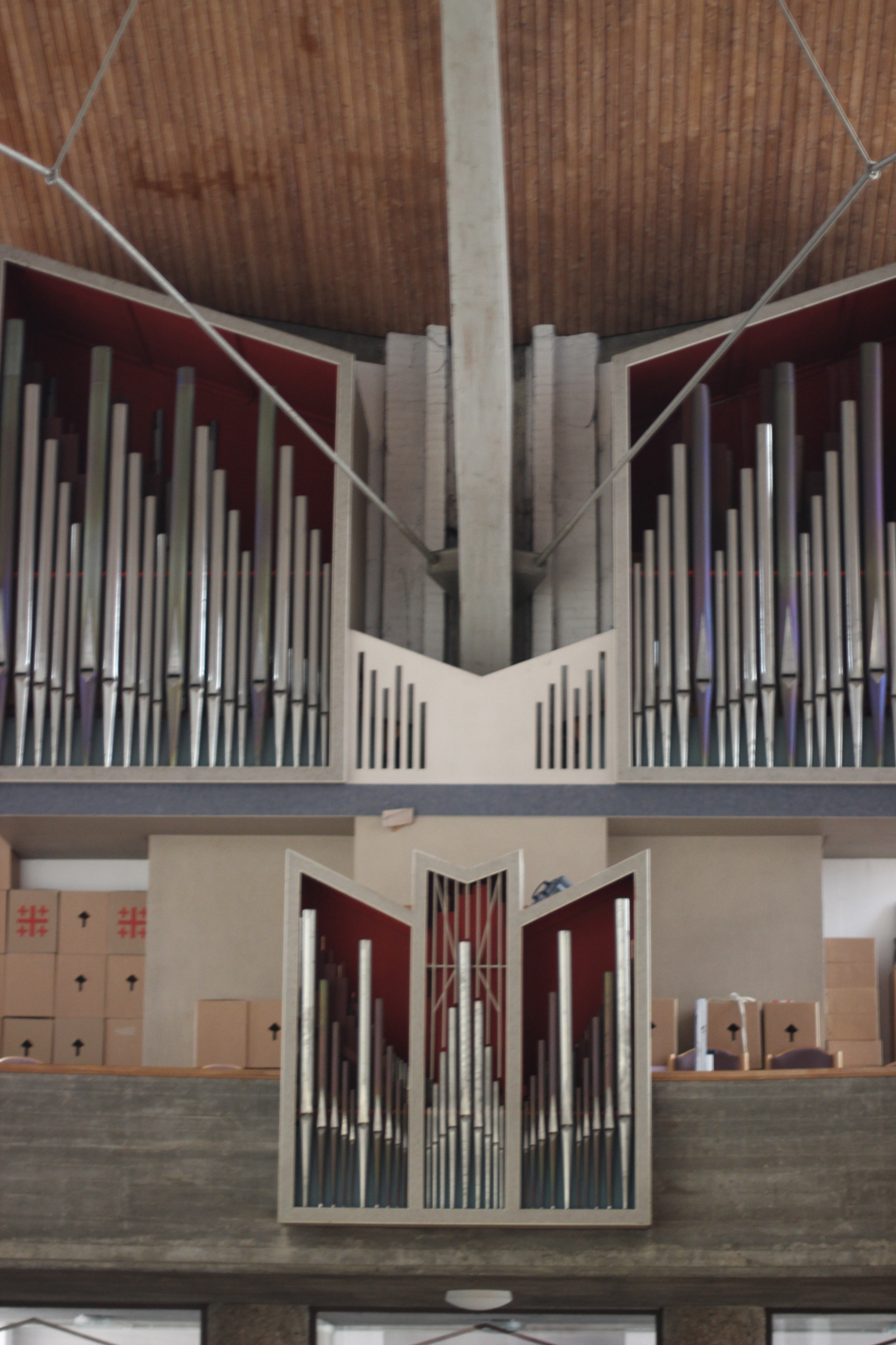 Orgel von St. Thomas in Augsburg